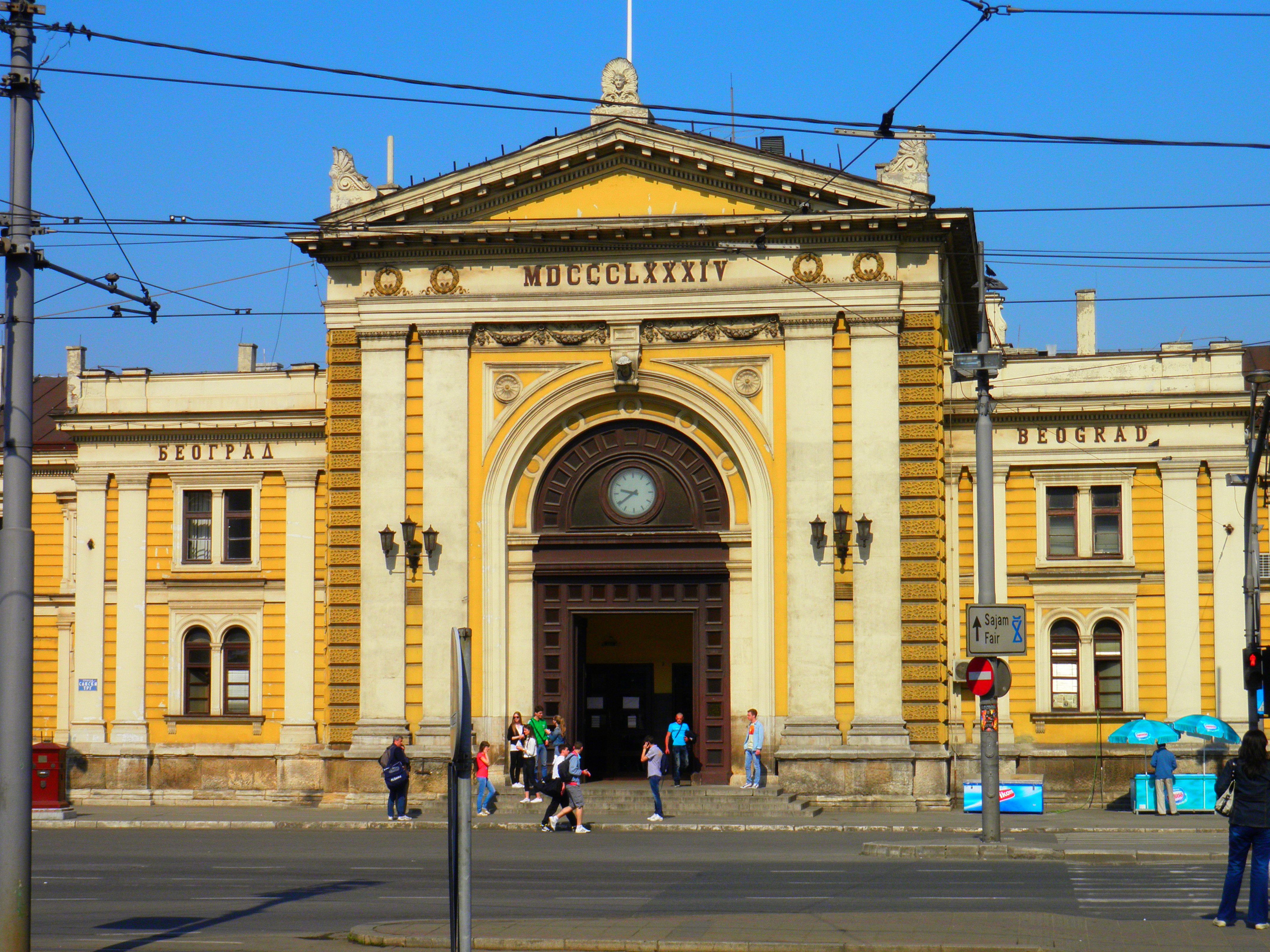 Železnička stanica